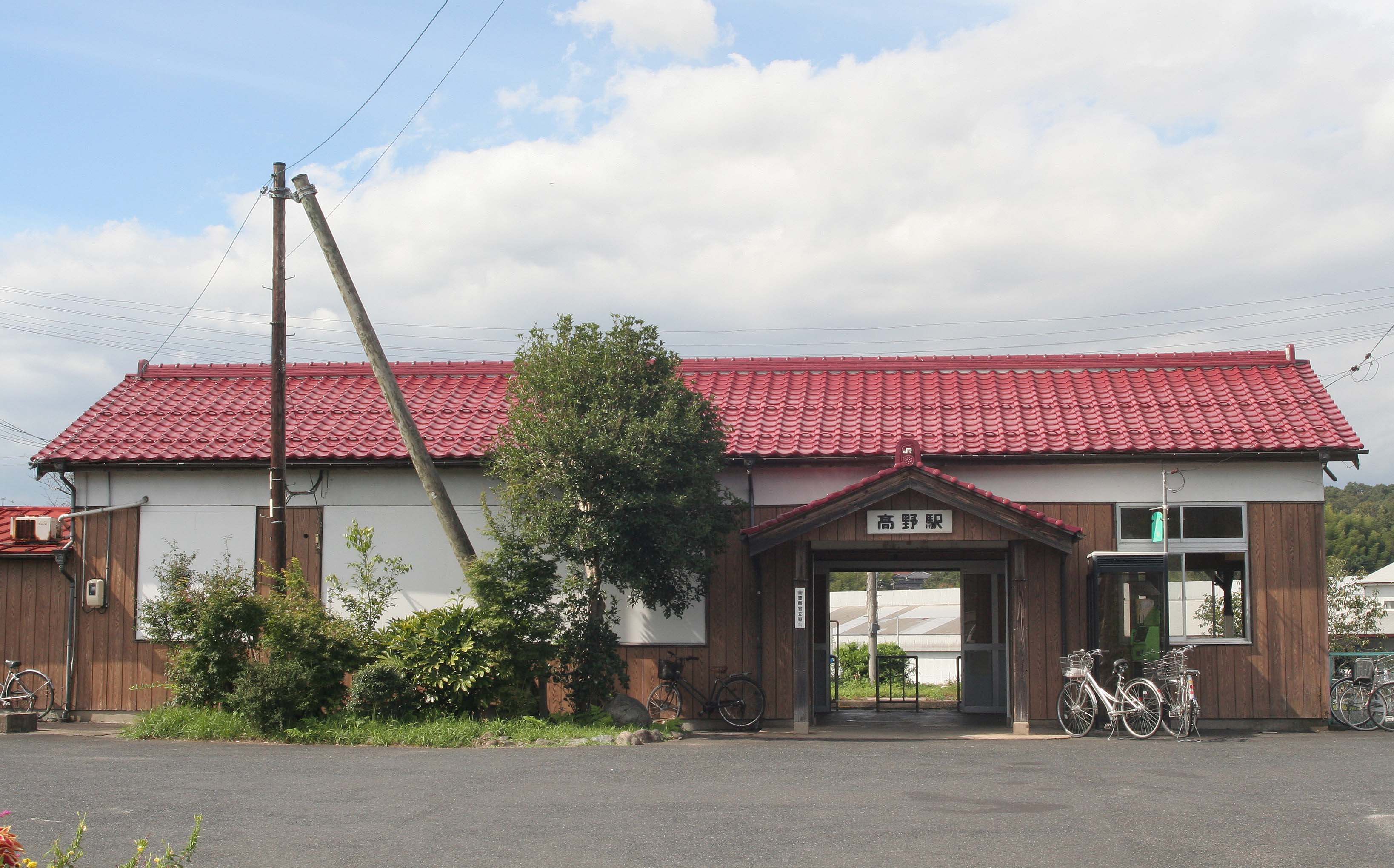 西日本旅客鉄道 高野駅の駅舎